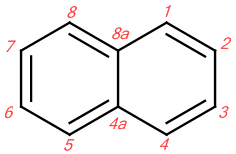 Naftalin IUPAC-konform számozása